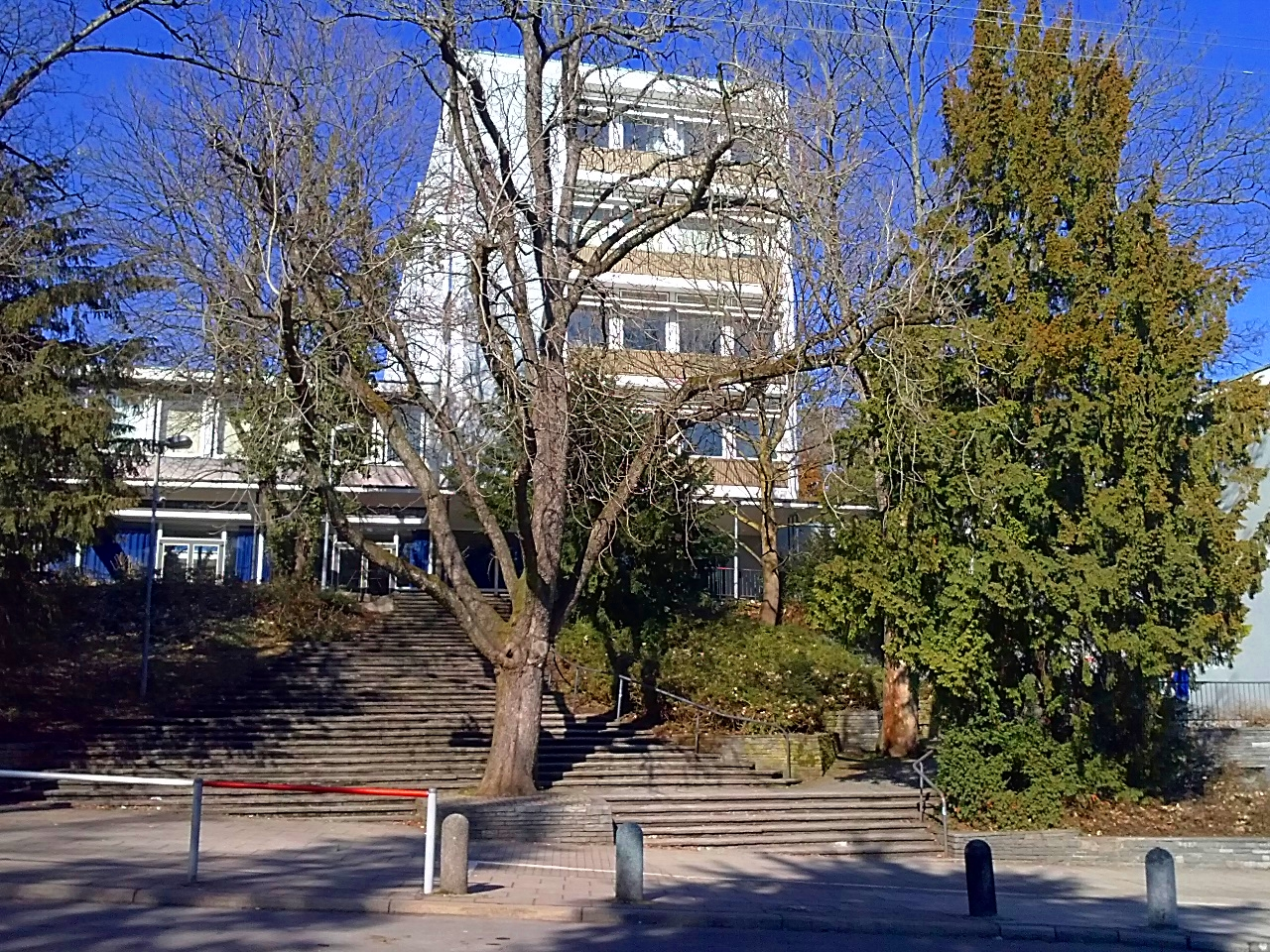 Die Haupttreppe des Eberhard-Ludwigs-Gymnasiums in Stuttgart 2013.